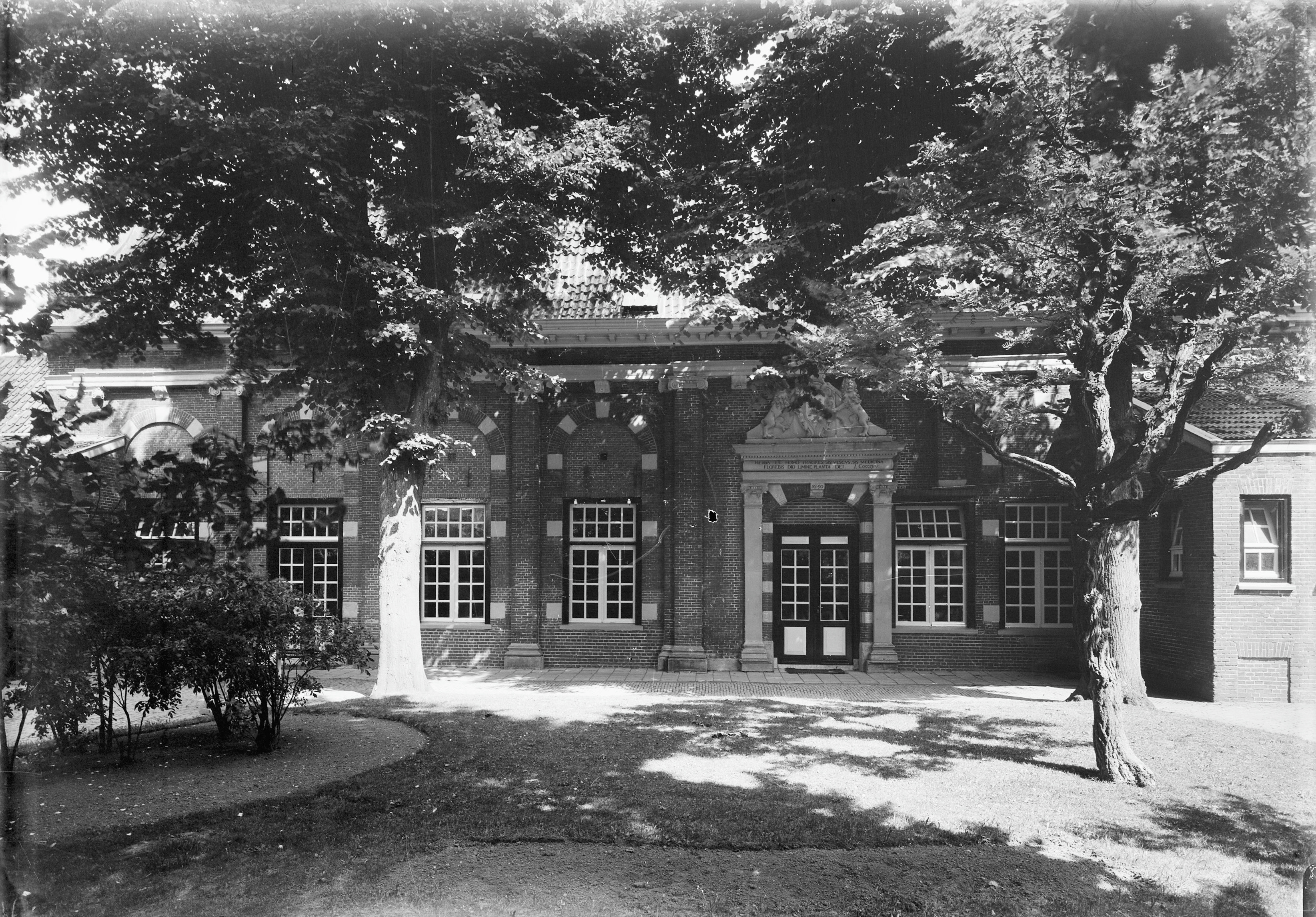 vm. Akademie: gevel en poort Hortus Botanicus